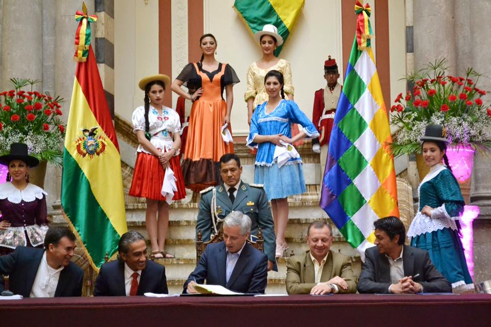 Promulgacion Ley Nacional de La Cueca Boliviana